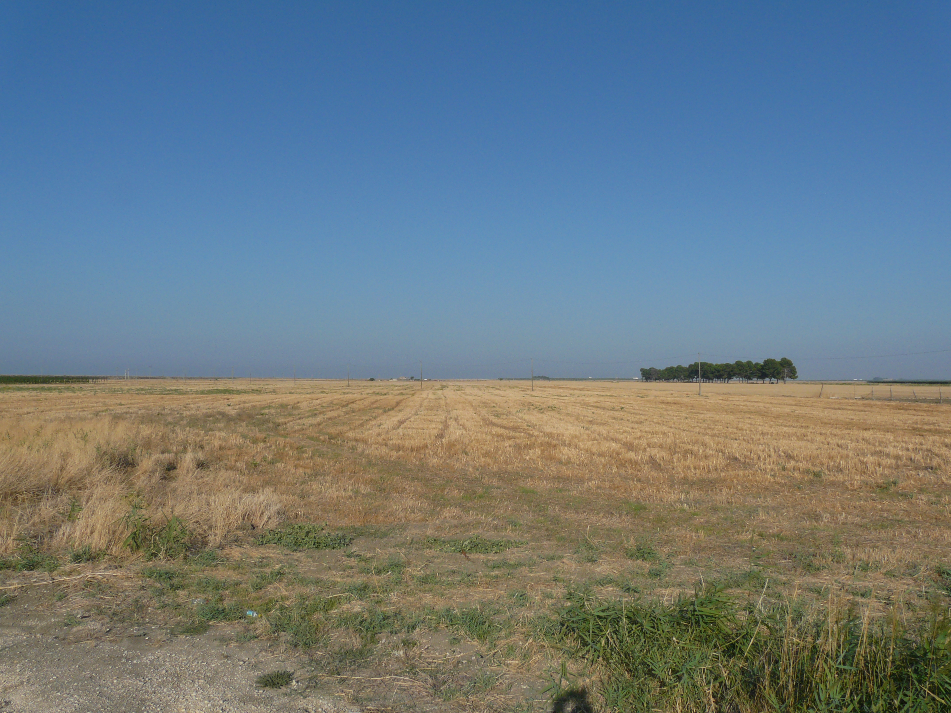 Puglia, particolare del tavoliere